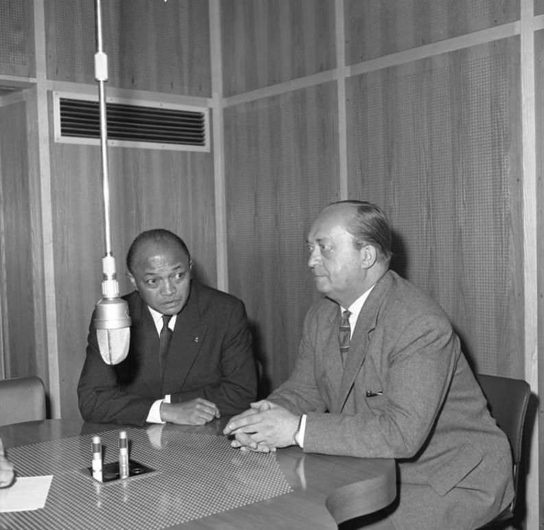 Madagaskar, Generalstabschef Ramanantsoa Interview im Bundespresseamt